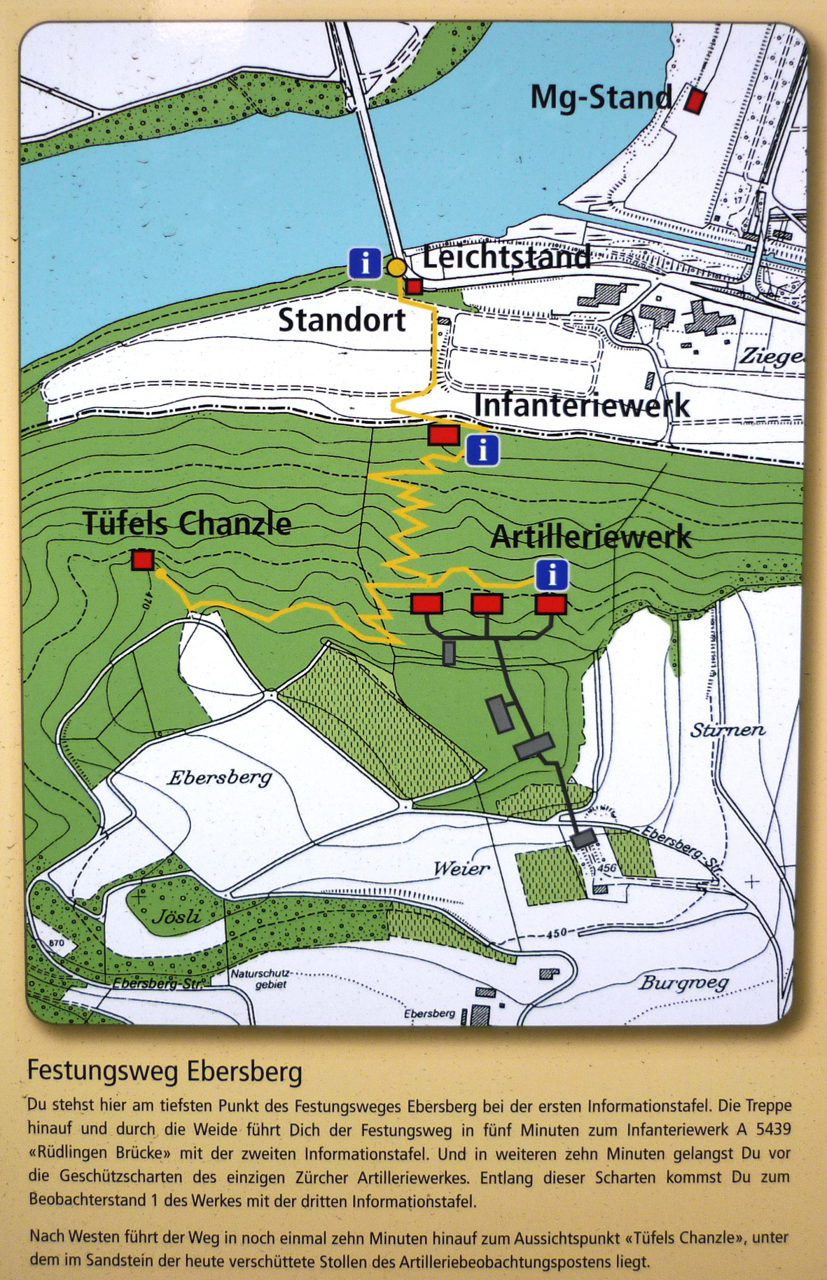 Festung Ebersberg ZH, Schweiz